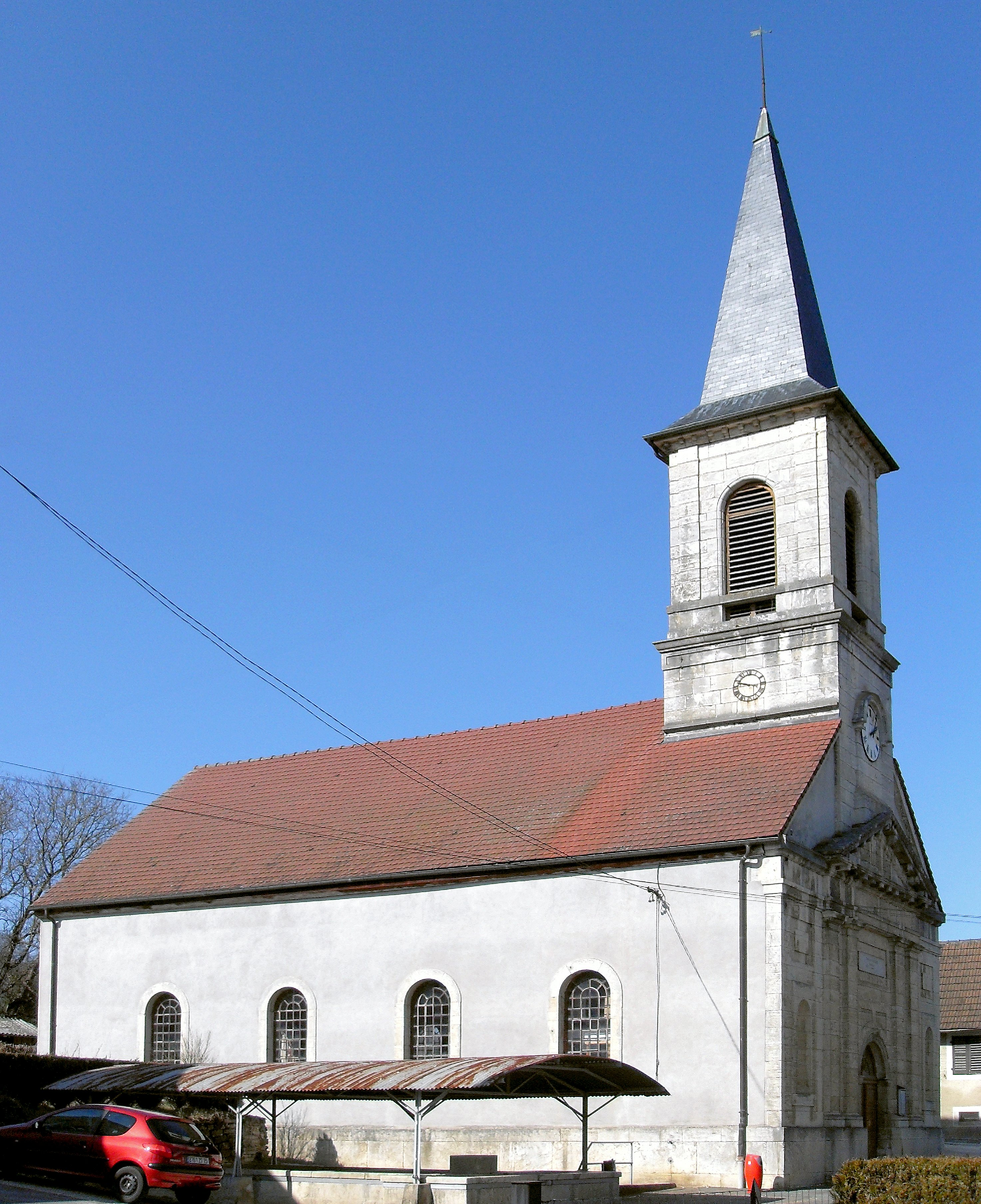 Le Temple luthérien à Saint-Badevel